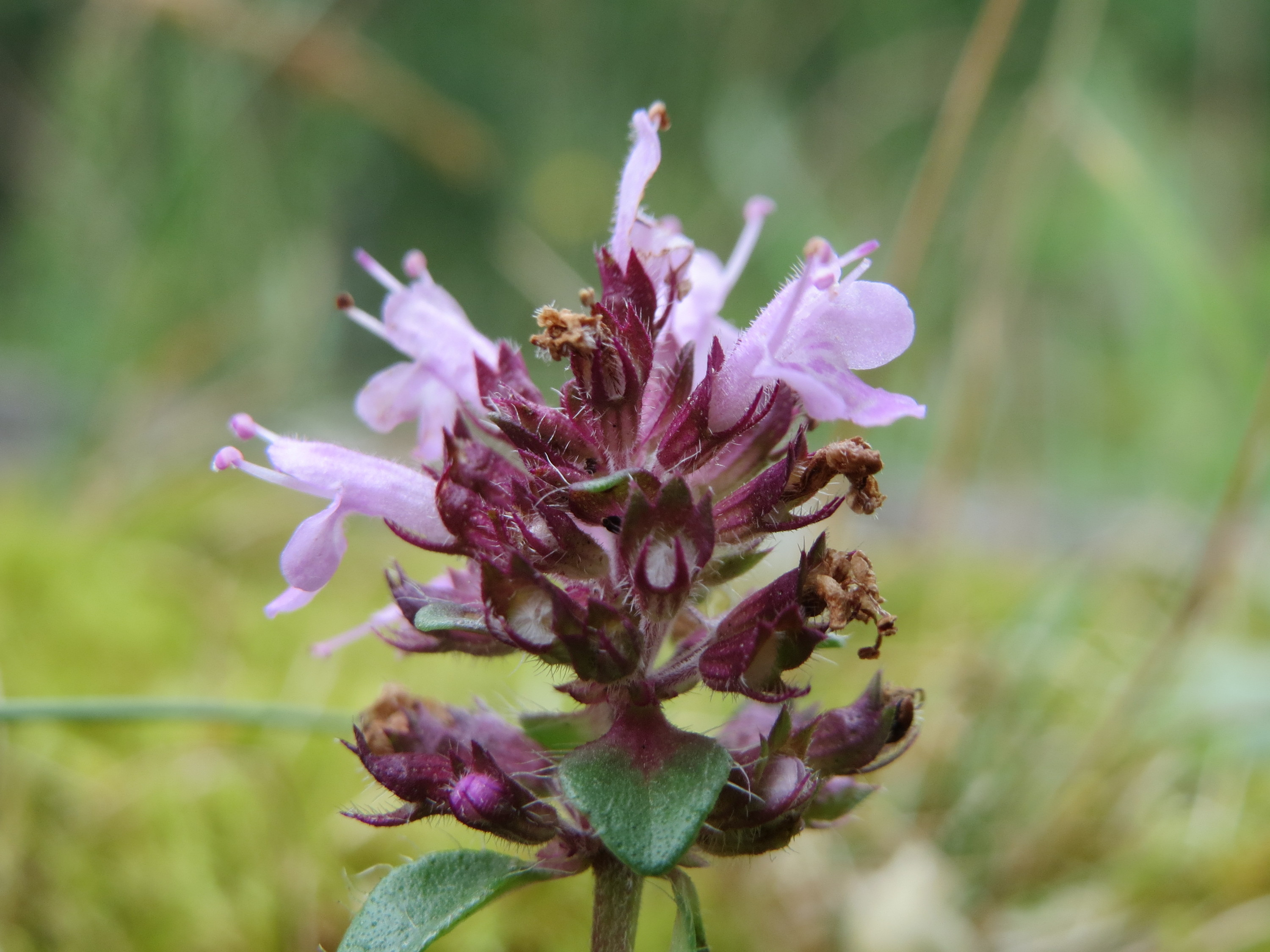 Sand-Thymian (Thymus serpyllum) im Naturschutzgebiet Birzberg